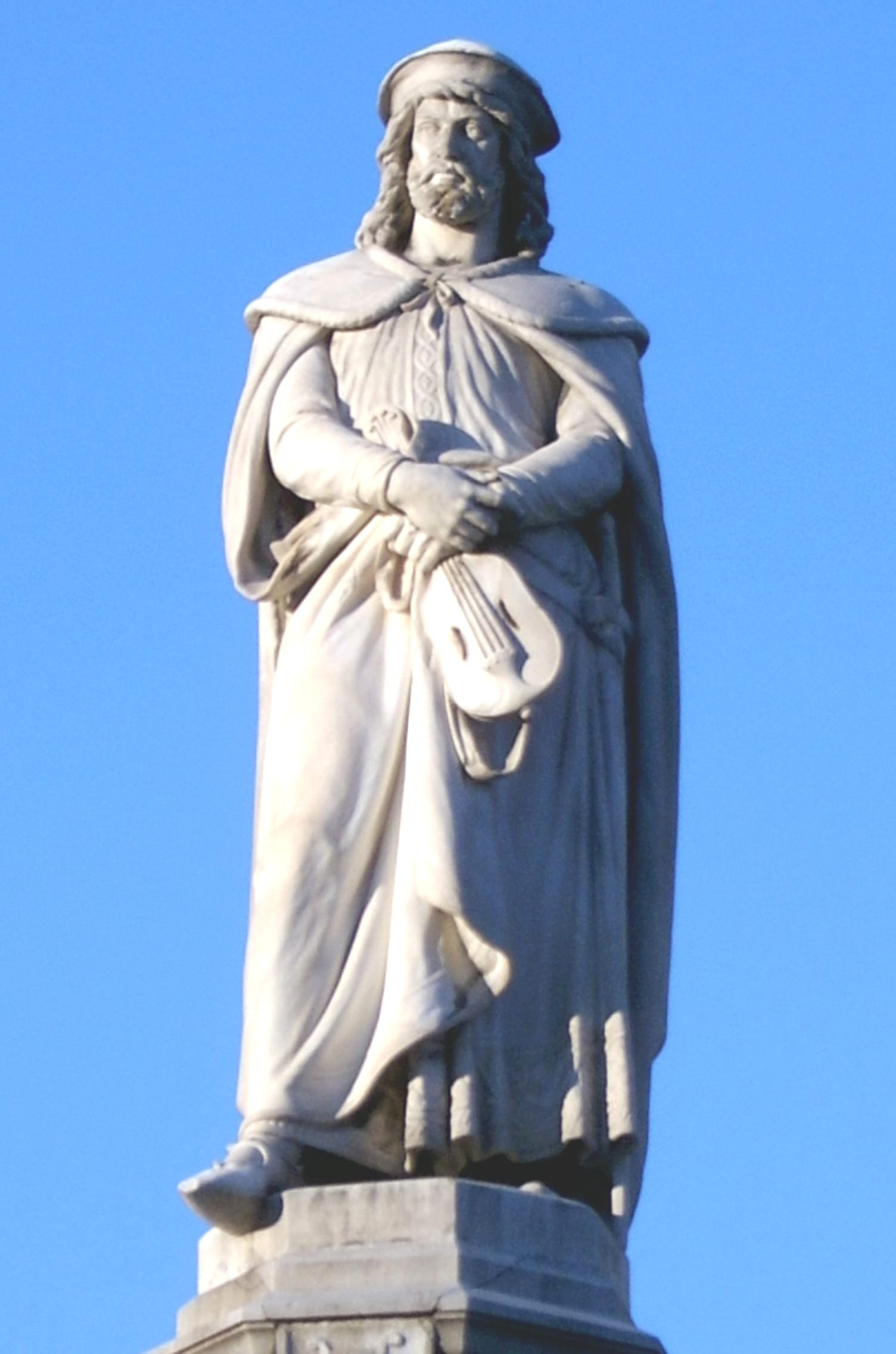 Das Waltherdenkmal von Heinrich Natter in Bozen stellt Walther von der Vogelweide dar, Ausschnitt ohne Sockel